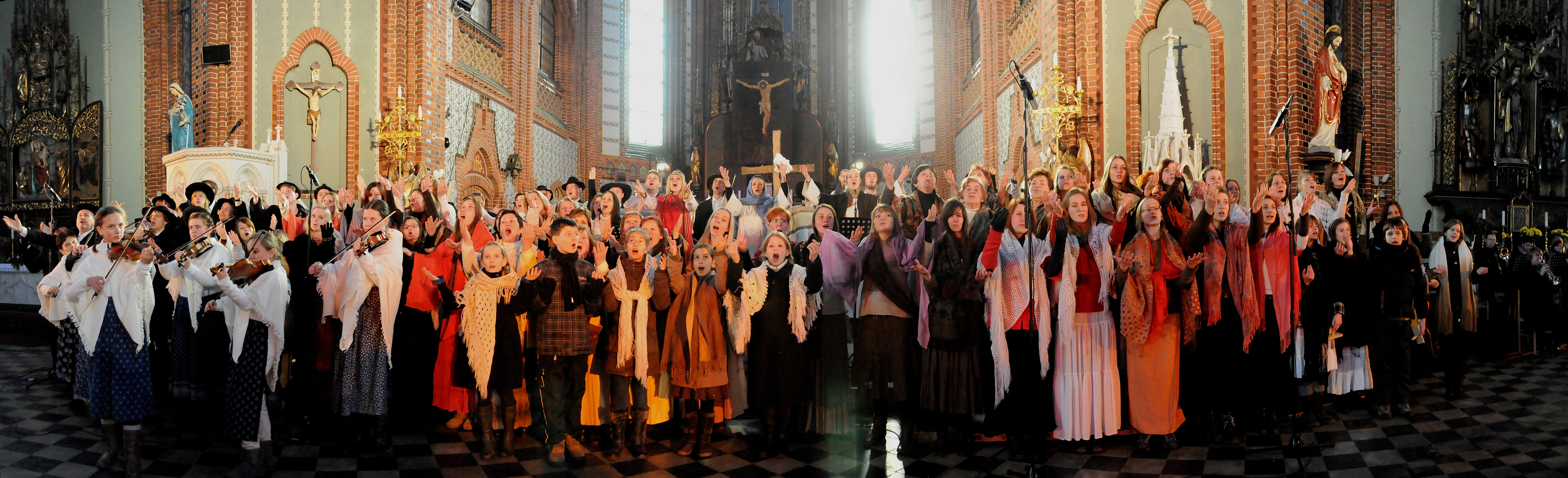 Oratorium Pavla Helebranda Evangelium podle houslí